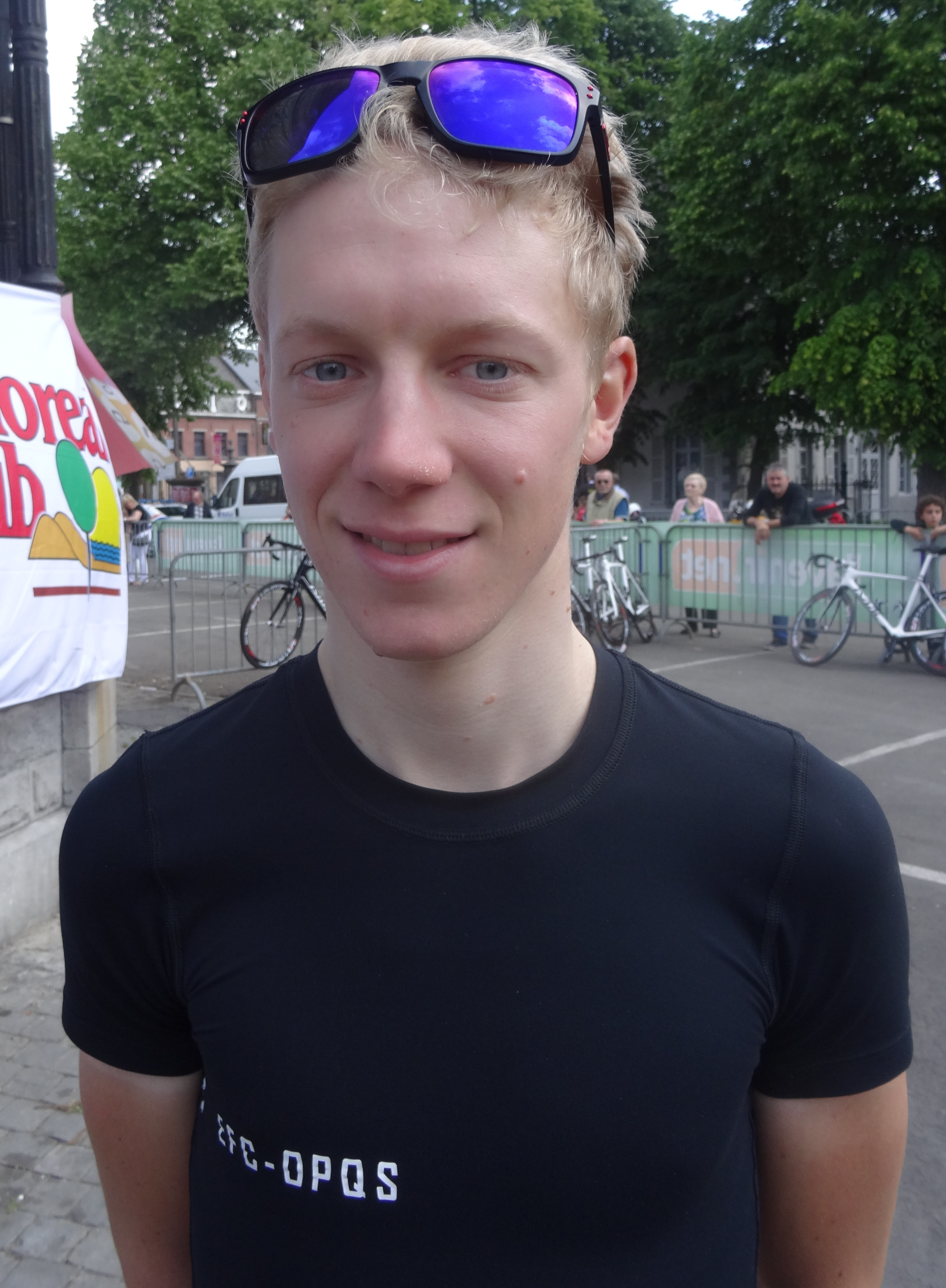 Reportage réalisé le samedi 17 mai à l'occasion du départ du Grand Prix Criquielion 2014 à Boussu, Belgique.